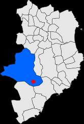 Situació exacte de Sant cebrià dels Alls